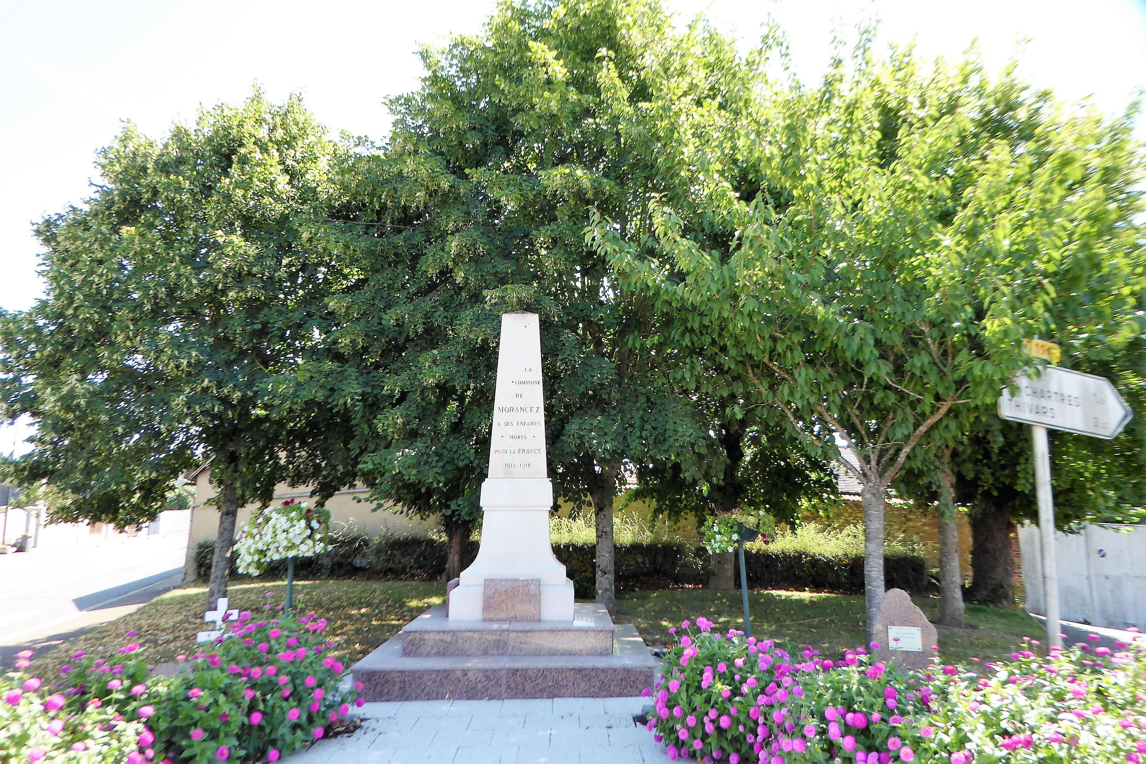 monument aux morts de Morancez, Eure-et-Loir, France.